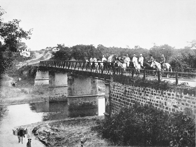 Ponte sobre o rio Coxipó construída em 1898 em Cuiabá, mT